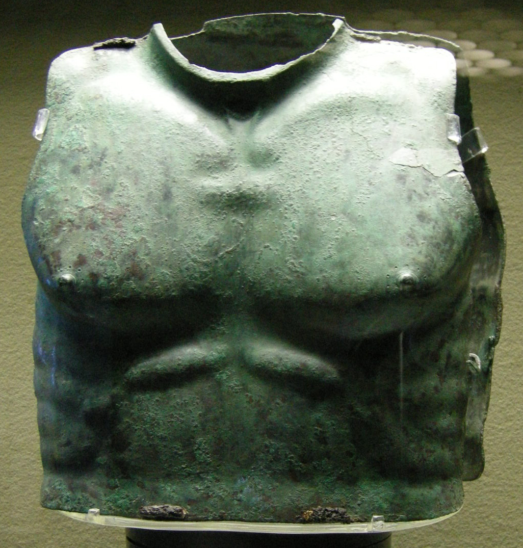 Museo archeologico regionale paolo orsi, corazza in bronzo, da tomba 5 necropoli della fossa, 370-340 ac.